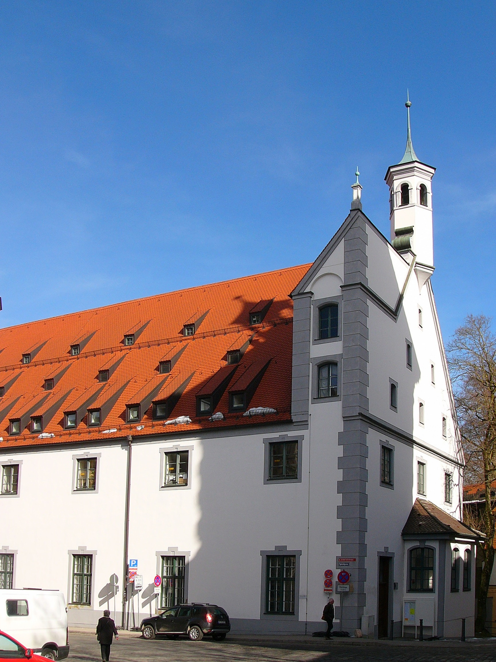 Ehem. Kapelle des Heilig-Geist-Spitals. This is a photograph of an architectural monument.